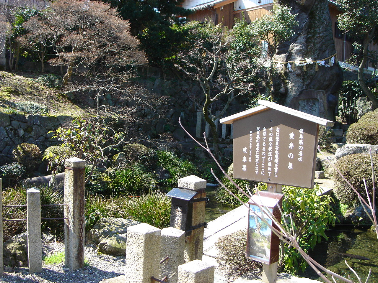 Tarui-no-Izumi（垂井の泉）,Tarui,Gifu,Japan(岐阜県垂井町)で撮影